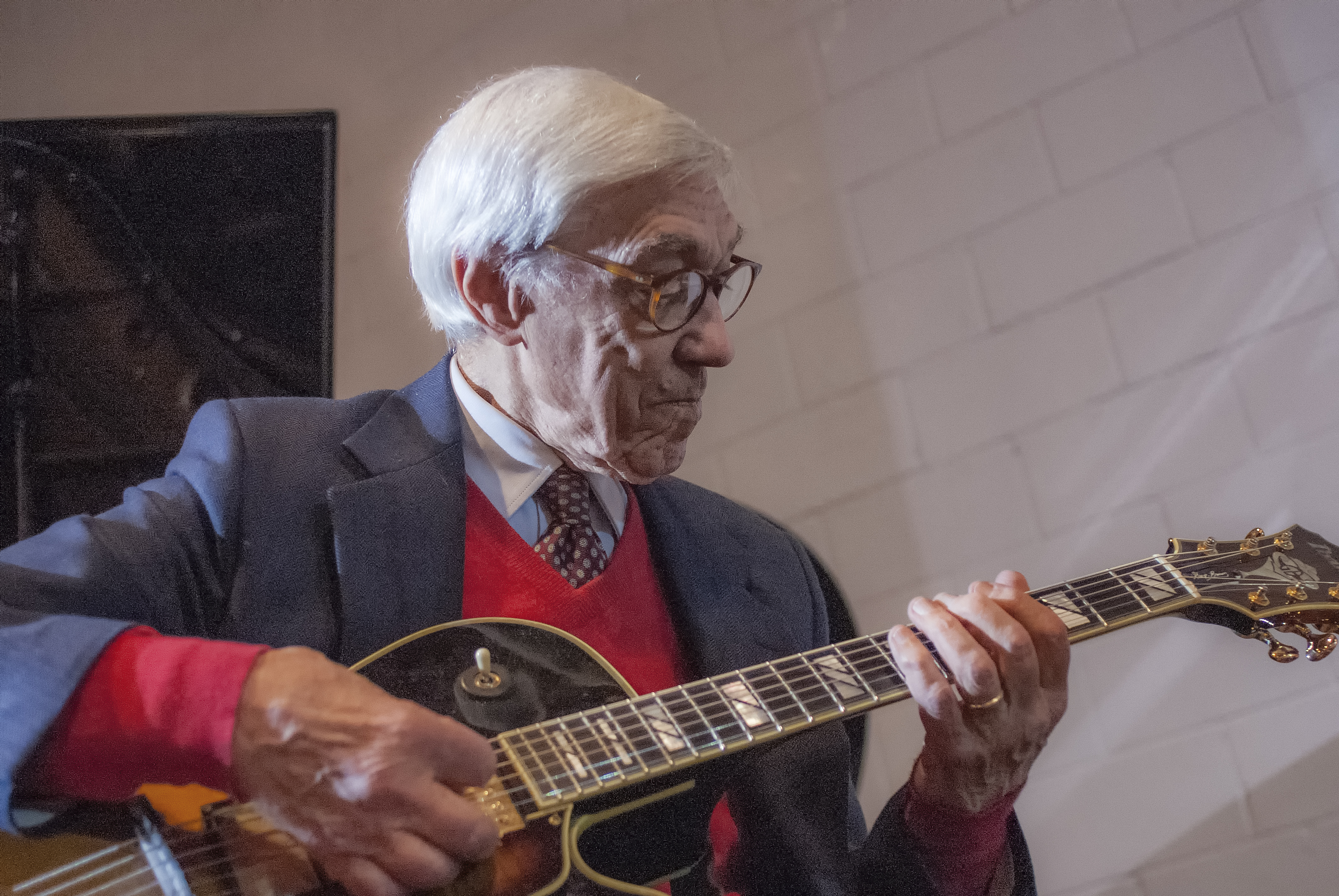 Franco Cerri è un chitarrista italiano